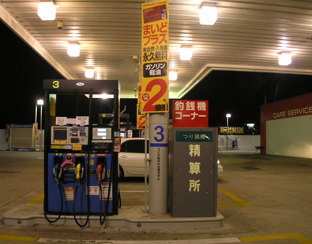 セルフスタンド出光 Idemitsu self-service gas station